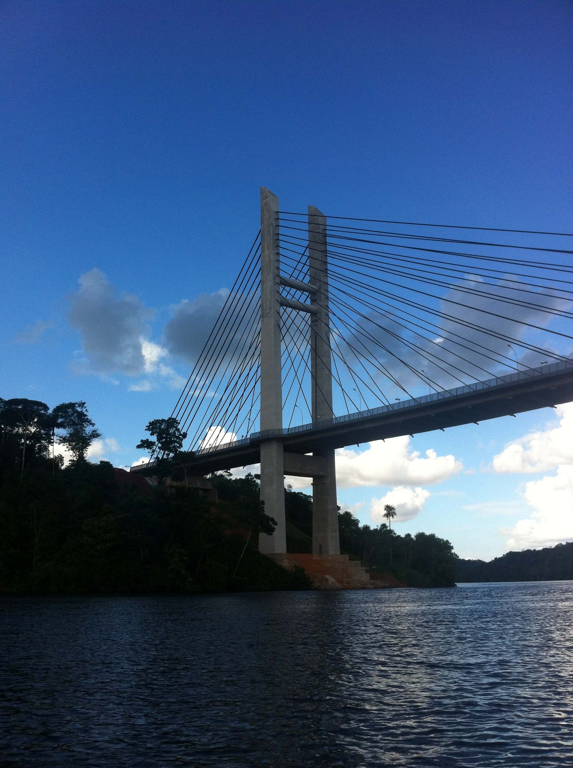 pont terminé en aout 2011